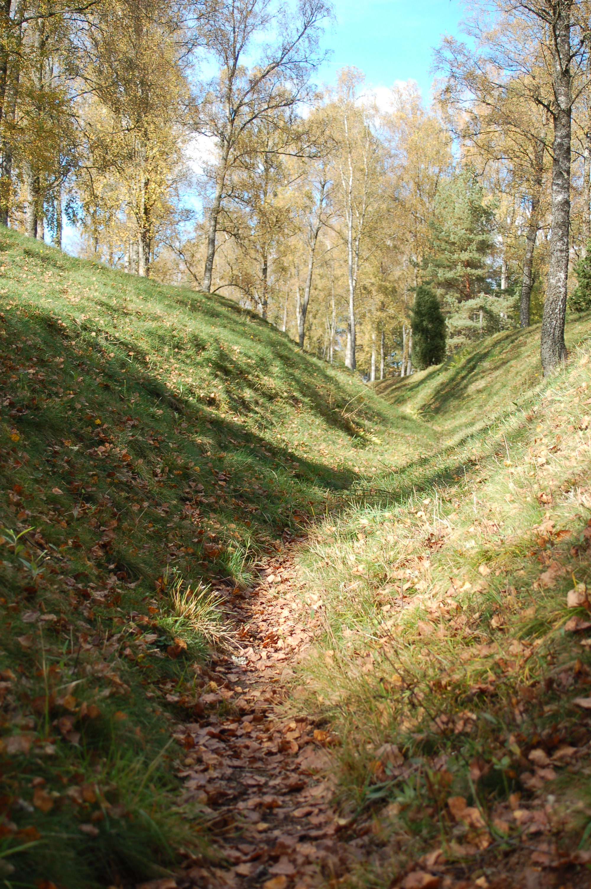 Hålvägarna i Timmele. Foto Katrin Högborn